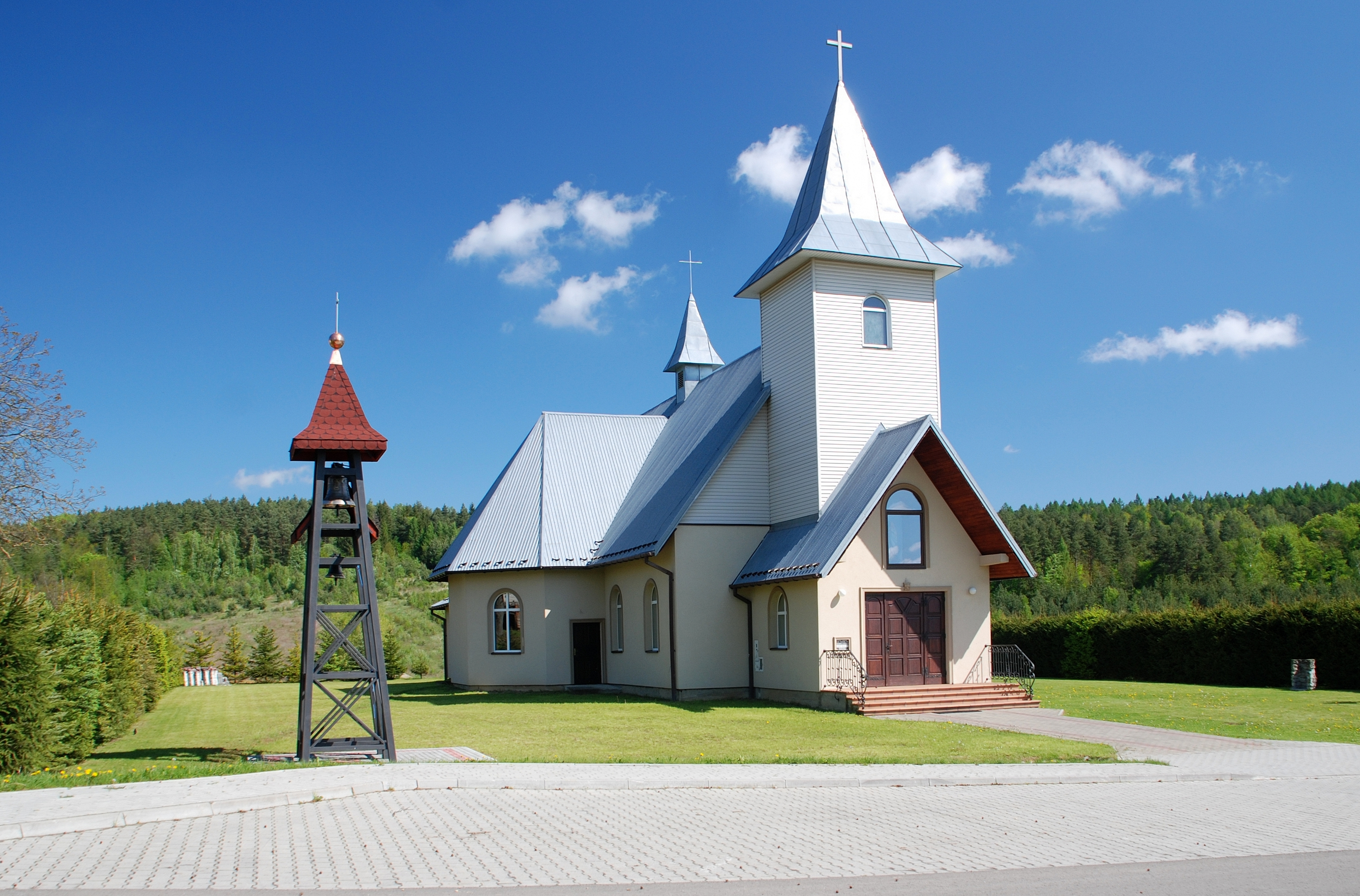 wieś Jawornik Ruski